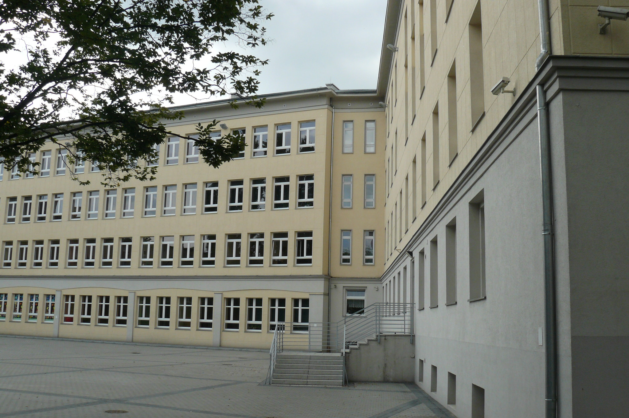 Szkoła przy ul. Łukaszewicza w Poznaniu.